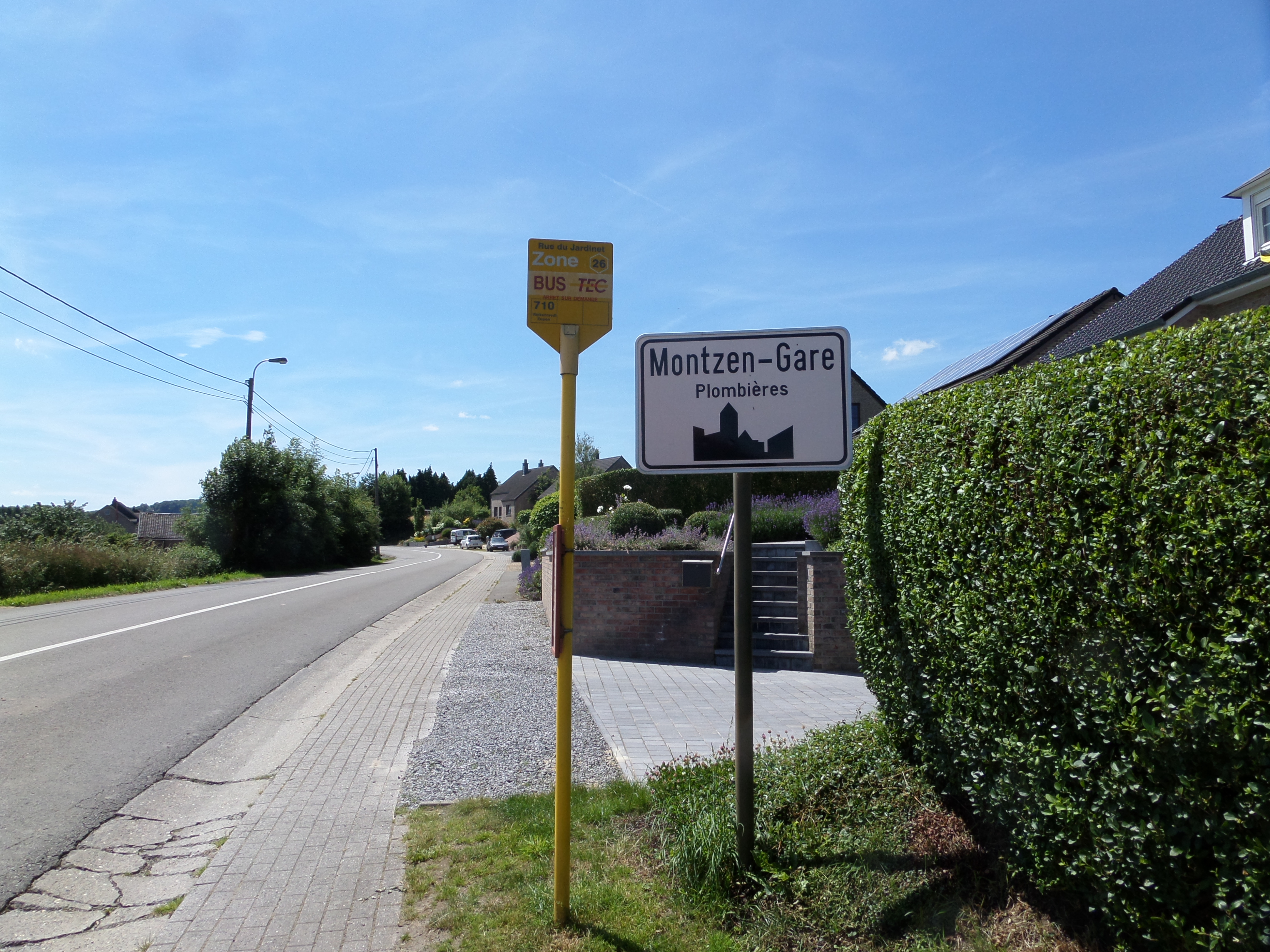 Panneau d'entrée de Montzen-Gare (commune de Plombières) dans dans la province Belge de Liège